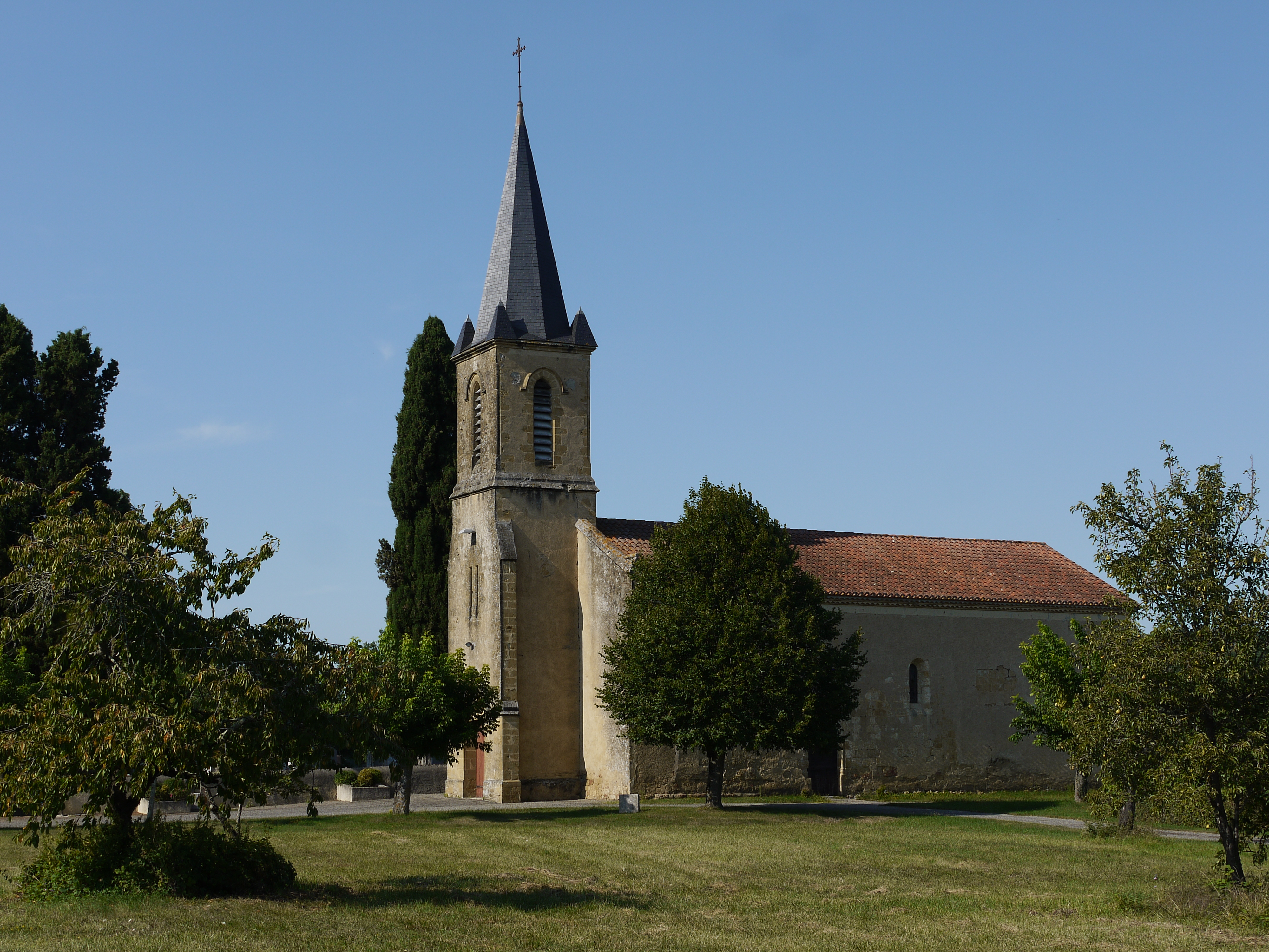 Vue depuis le sud-ouest de l'église Saint-Martin de Sère